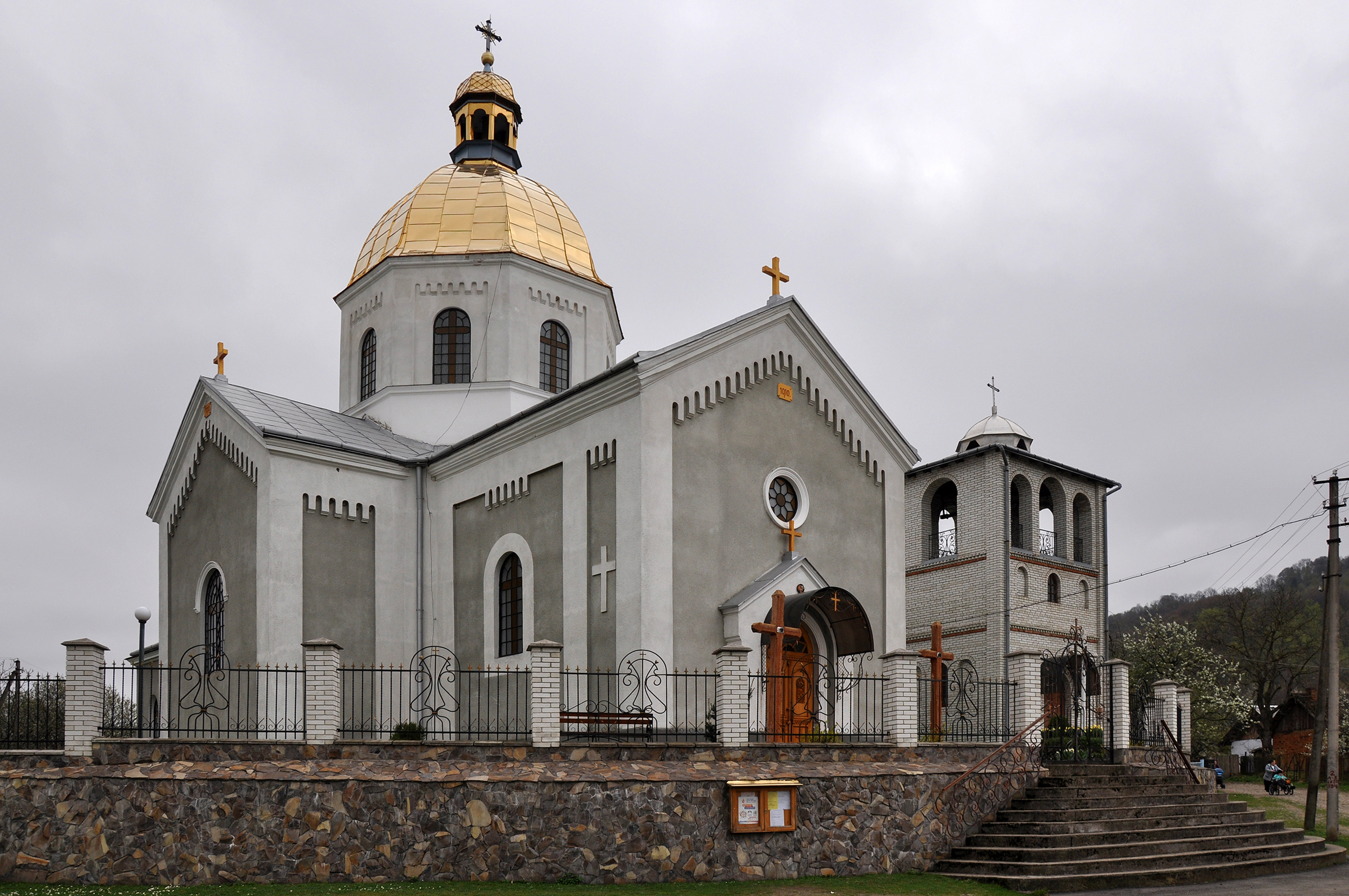 Церква Св.Миколая (мур.), с.Розгірче